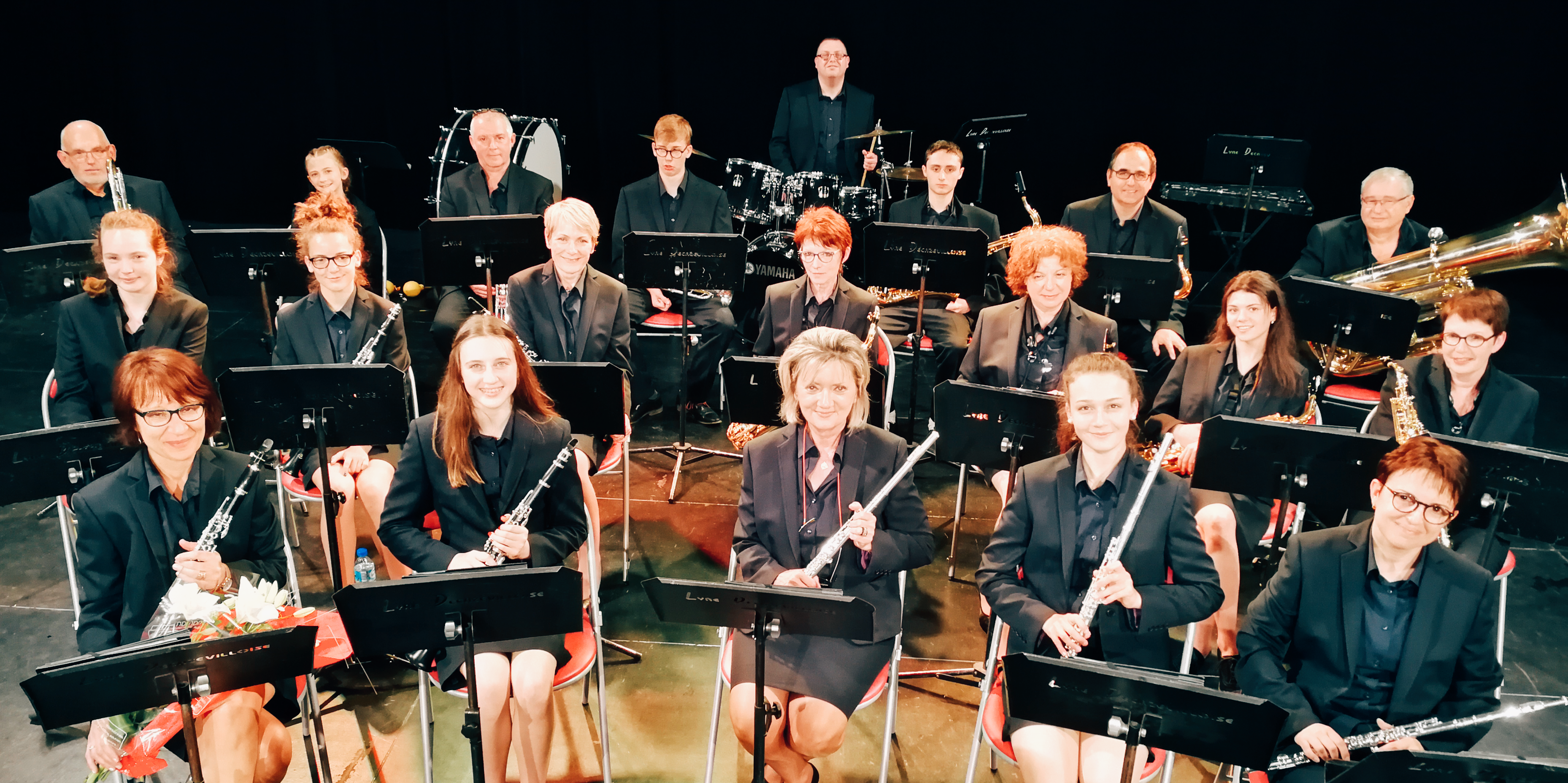 La Lyre decazevilloise, photo officielle du samedi 26 mai 2018. Salle Yves-Roques de Decazeville (Aveyron).